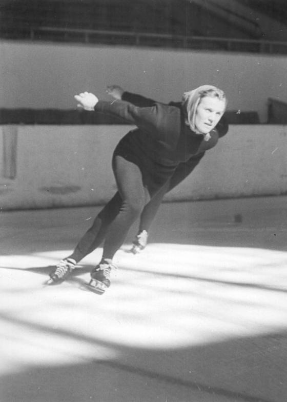 Helga Haase Zentralbild Dressel-26.9.1957 Dr-Ho- Das Taining der Eisschnelläufer hat in der Werner-Seelenbinder-Halle begonnen. Rund 250 Nachwuchskräfte werden auf der Berliner Kunsteisbahn trainiert, zwischen ihnen laufen die besten Schnelläufer Deutschlands, Helmut Kuhnert (SC Dynamo), Helga Haase und Inge Görmer. UBz: Helga Haase beim Training. Abgebildete Personen: Haase, Helga: Eisschnelläuferin, Ehefrau von Helmut Haase, DDR